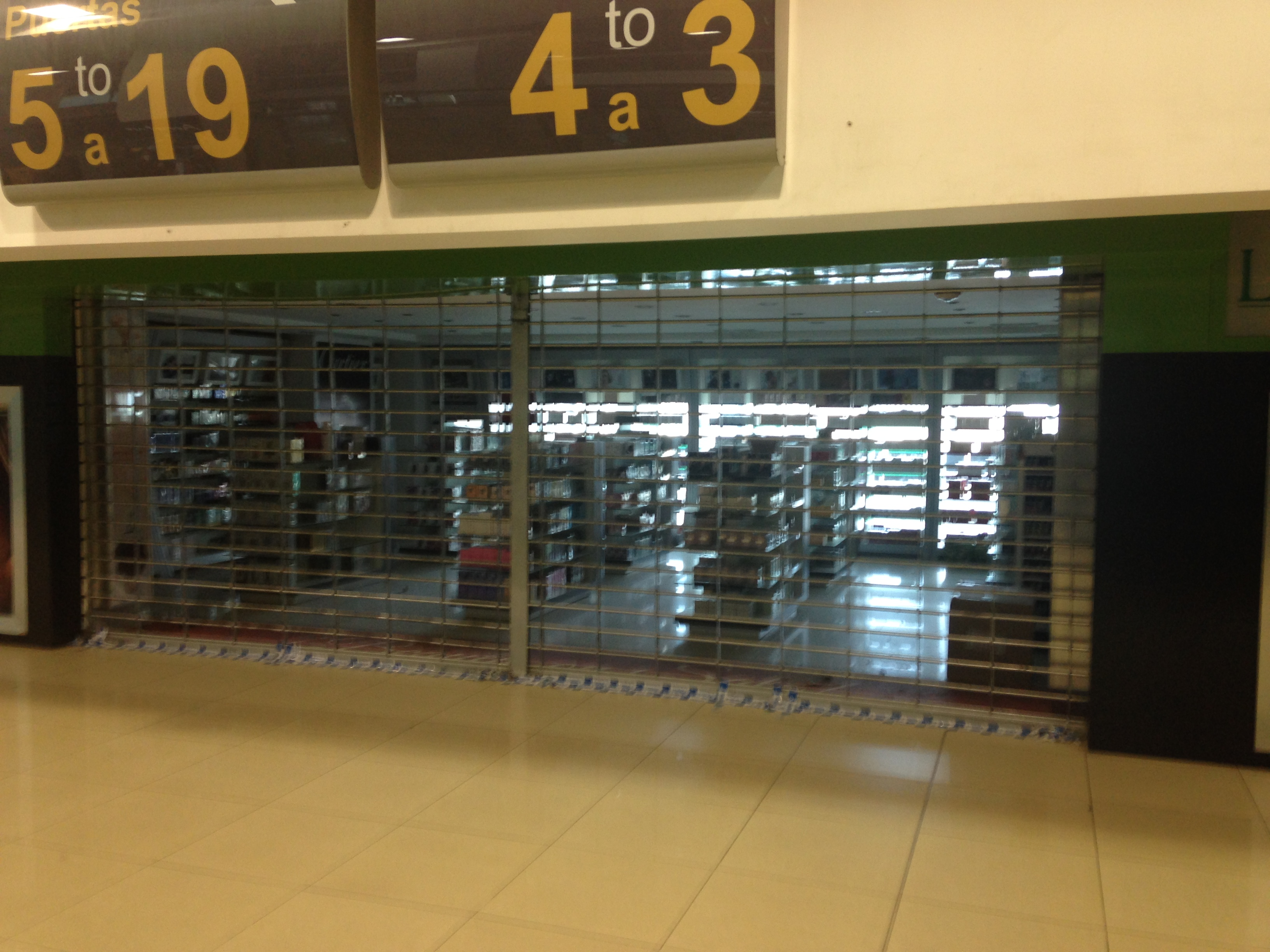 Tiendas "La Riviera" cerradas por el Ministerio Público guatemalteco en las instalaciones del Aeropuerto Internacional La Aurora.